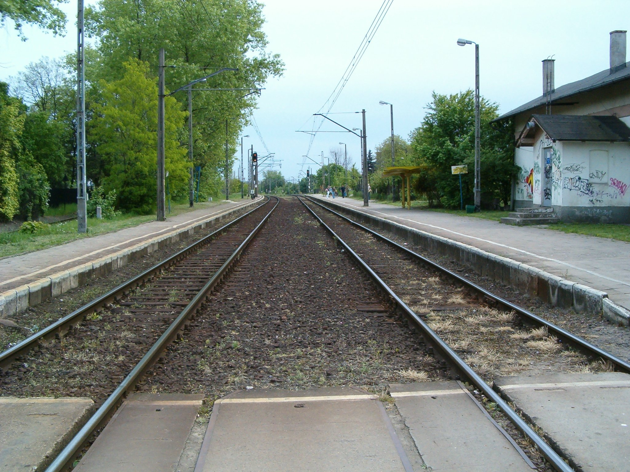 Przystanek kolejowy Poznań Dębina